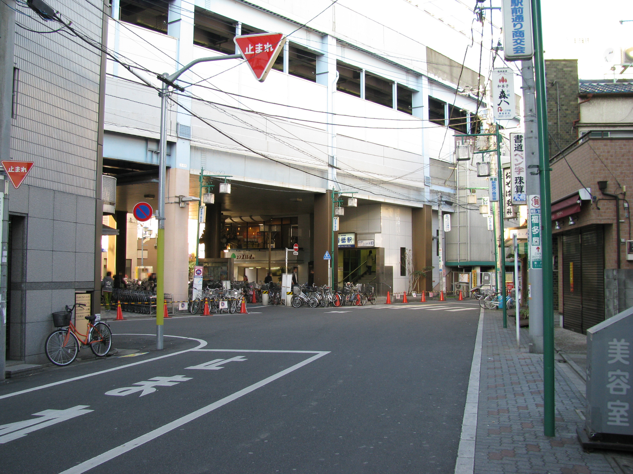 京成電鉄青砥駅